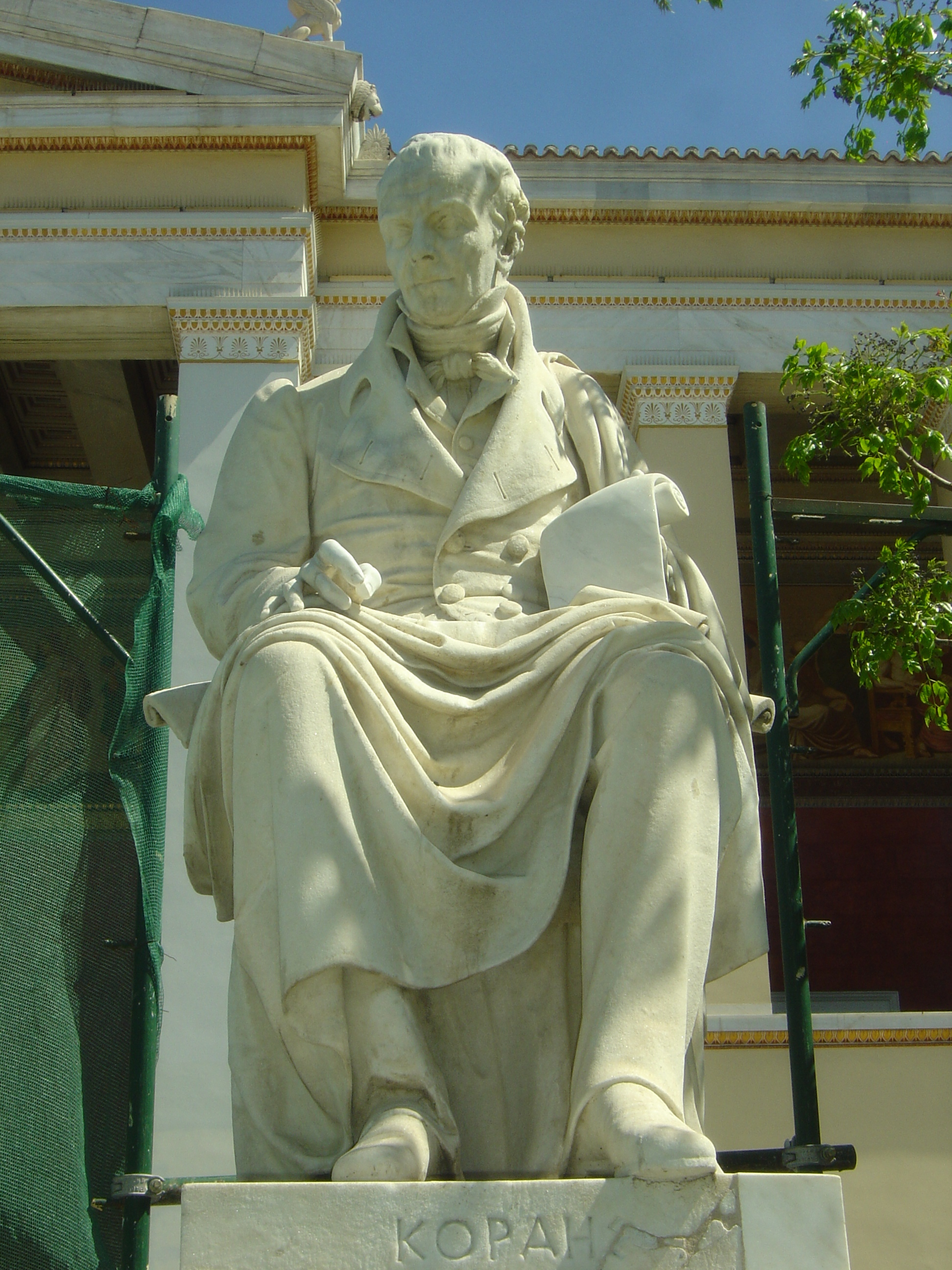 Ανδριάντας Αδαμάντιου Κοραή, Πανεπιστήμιο Αθηνών. Γλύπτης Ιωάννης Κόσσος (1822 - 1875).